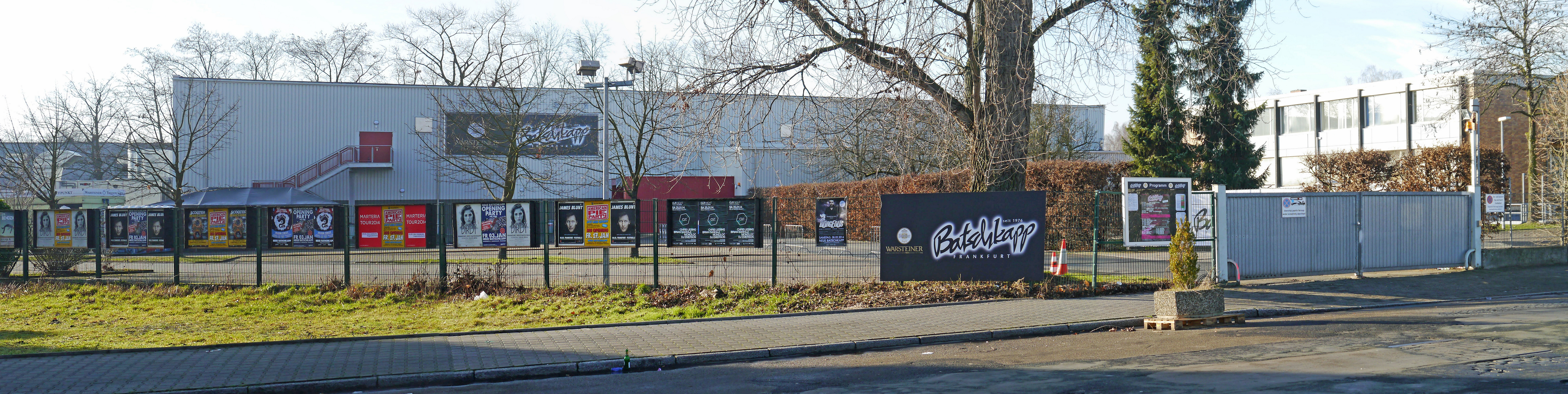 Die Batschkapp, 2014 an ihrem neuen Standort in Ffm-Seckbach, Gwinnerstrasse 5.